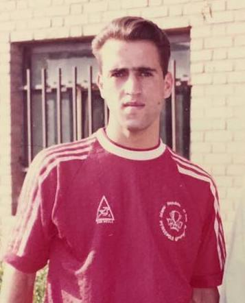 علی کریمی در اهواز ۱۳۷۹